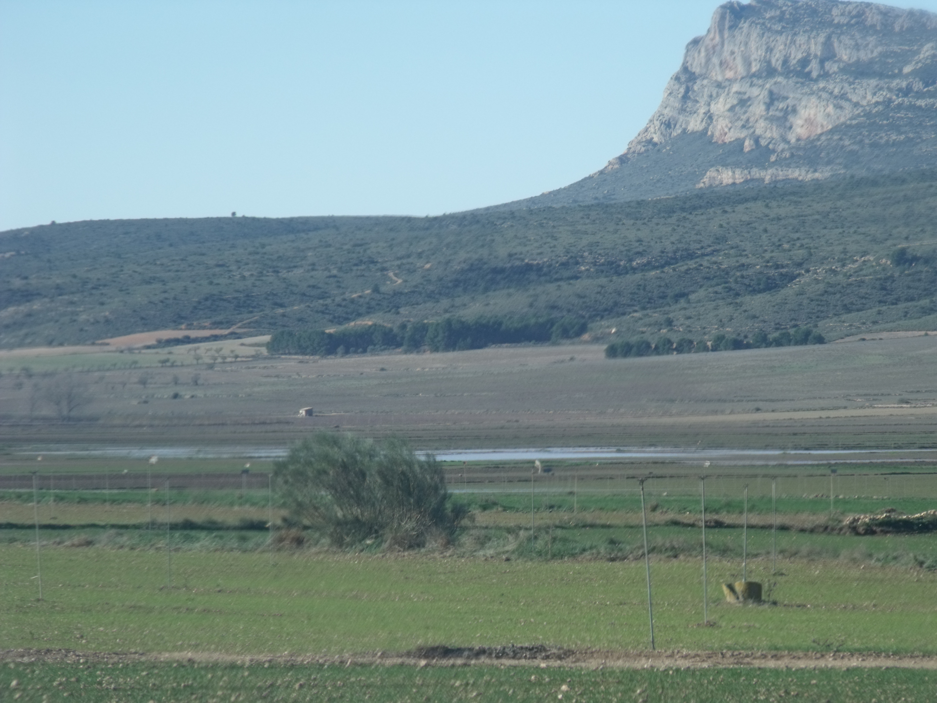 laguna de San Benito de Ayora